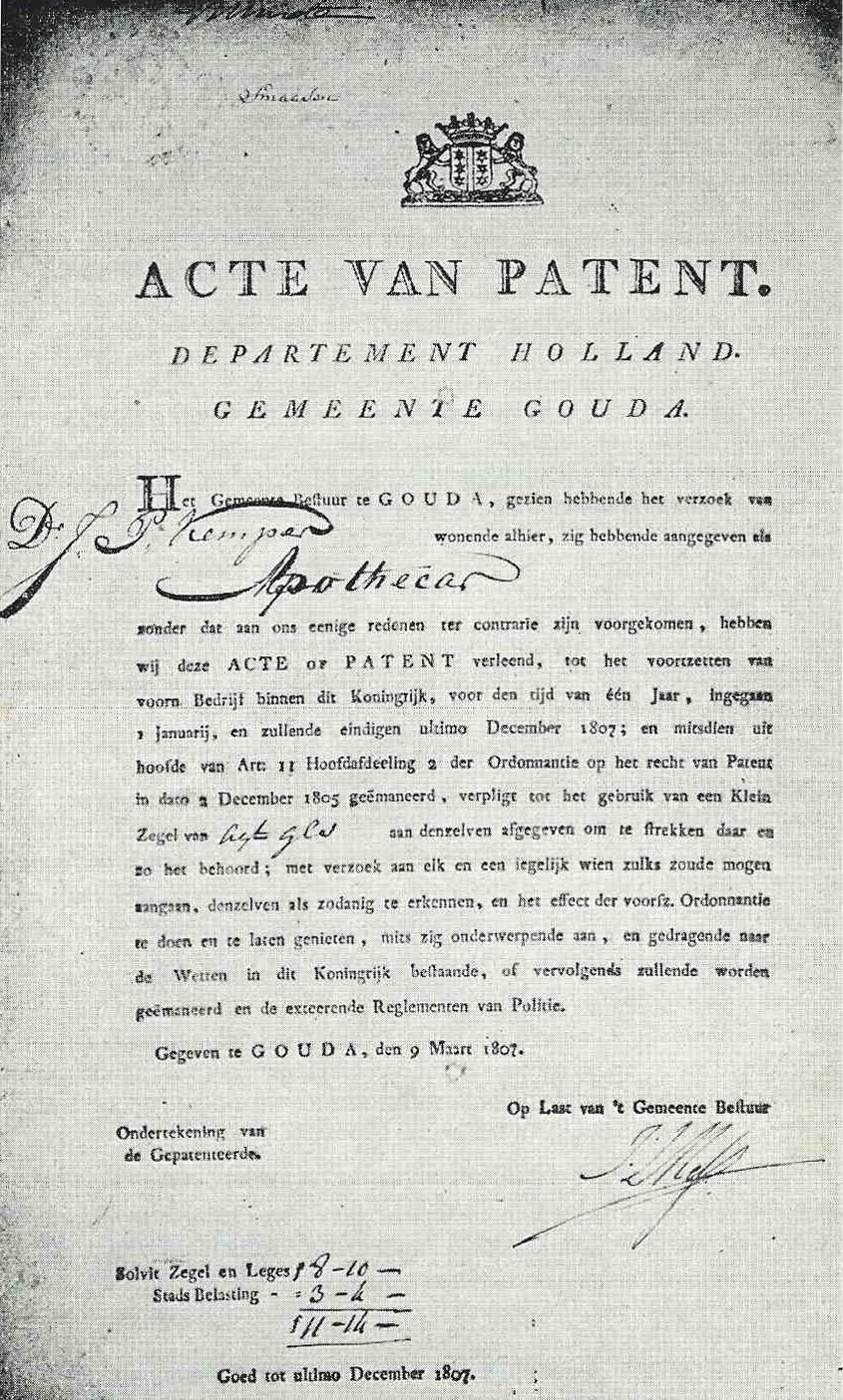 Acte van paten verleend aan de arts Dr. Jan Pieter Kemper t.b.v. de uitoefening van het apothekersbedrijf in Gouda